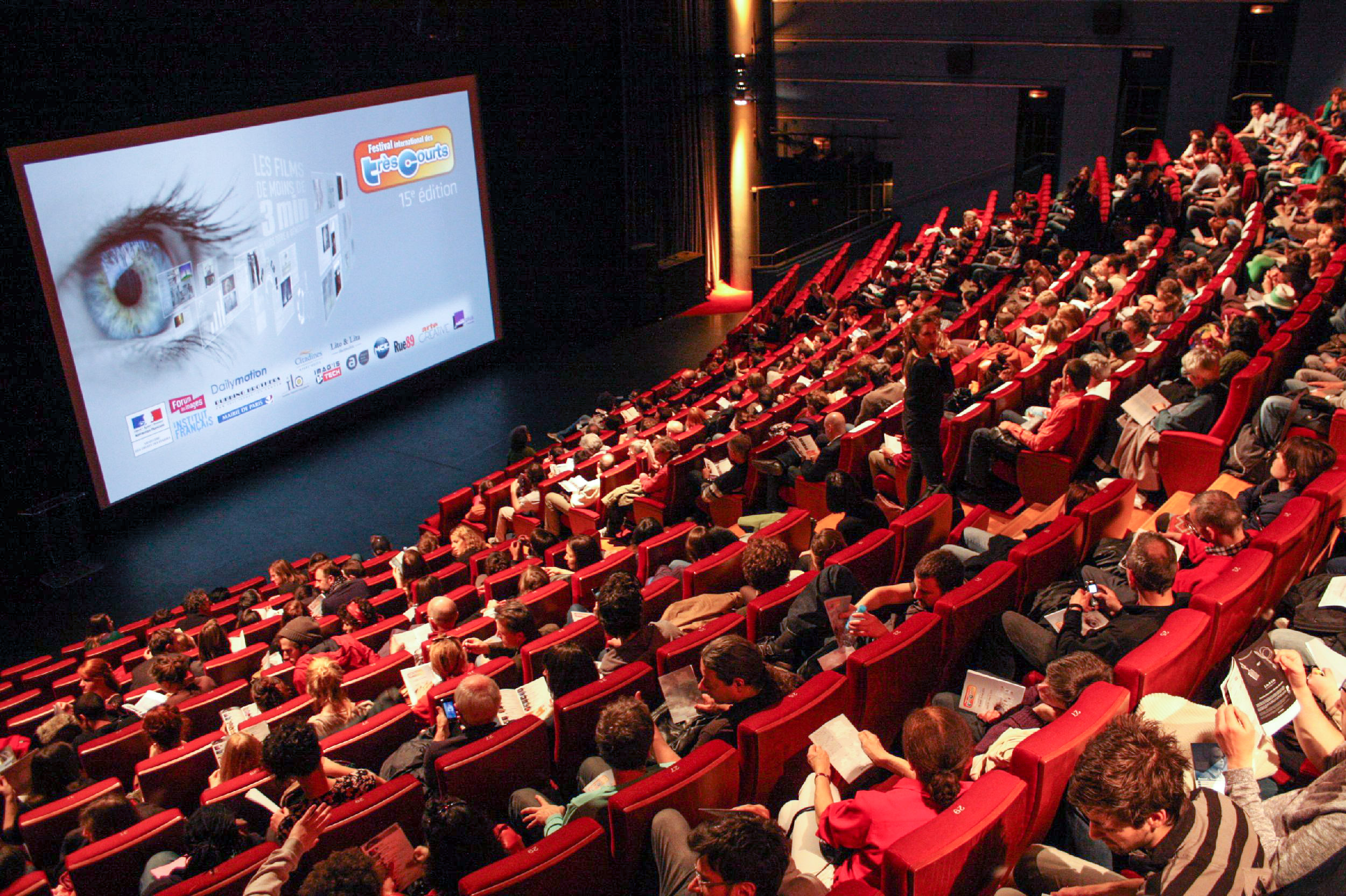 Festival des Très Courts - Forum des images - Paris - 3 mai 2013